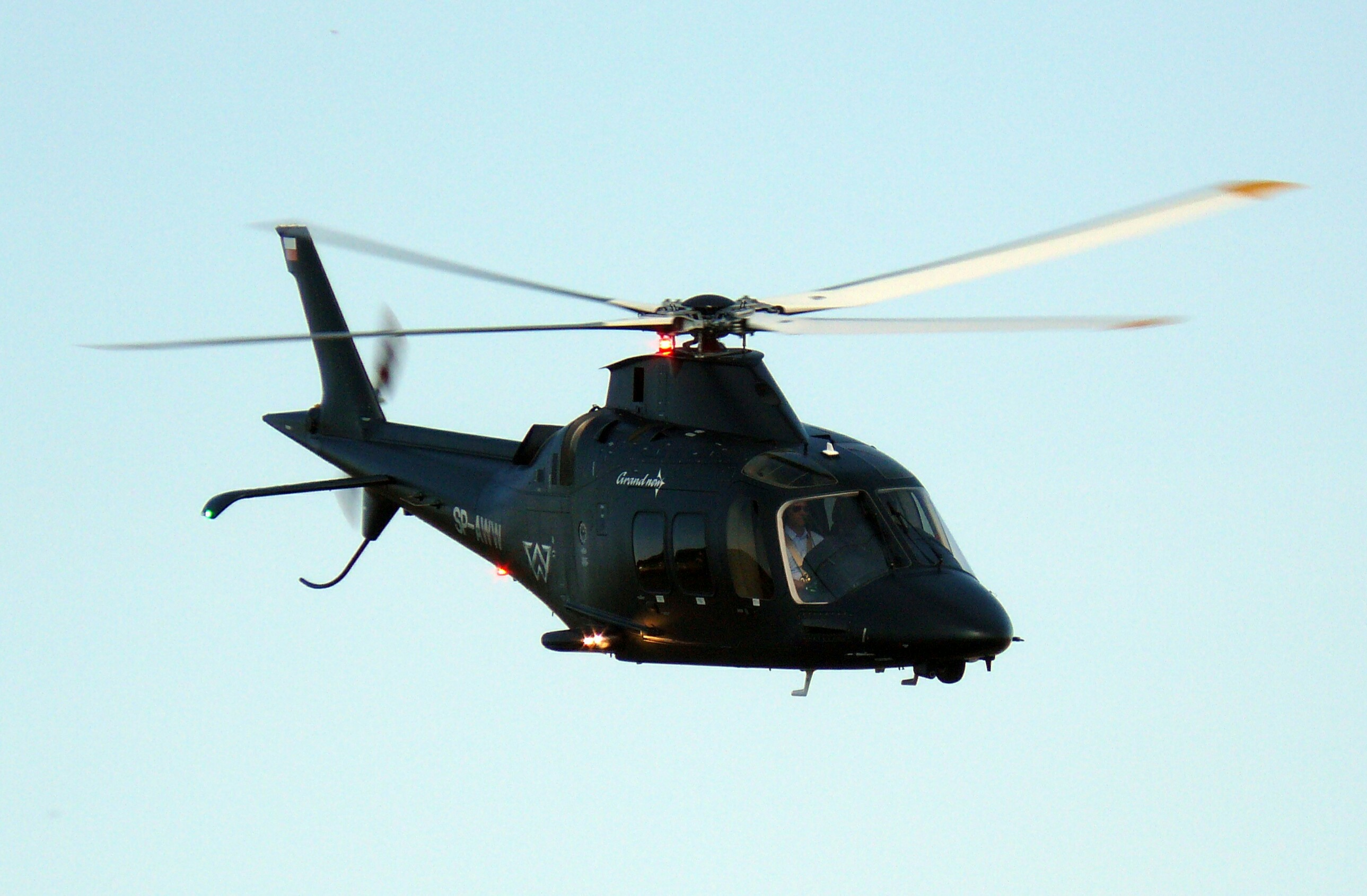 AgustaWestland AW109 Grand New, śmigłowiec zakupiony przez firmę Wiśniowski z Nowego Sącza, wersja transportowa VIP, znak rejestracyjny SP-AWW.